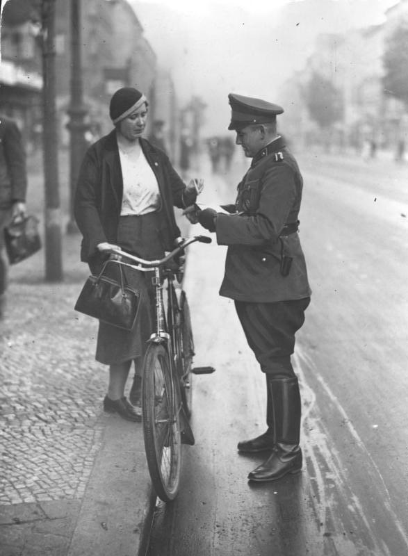 Scherl: Heute wieder Radfahrerrazzia (von 6.00 bis 20.00) UBz: Die Personalien einer Verkahrssünderin werden festgestellt (Chausseestrasse), da sie auf der Mitte der Fahrbahn, statt äußerst rechts gefahren ist. Nach der preußischen Verkehrsordnung sollen Radfahrer grundsätzlich einzeln und äußerst rechts fahren. 36021-34